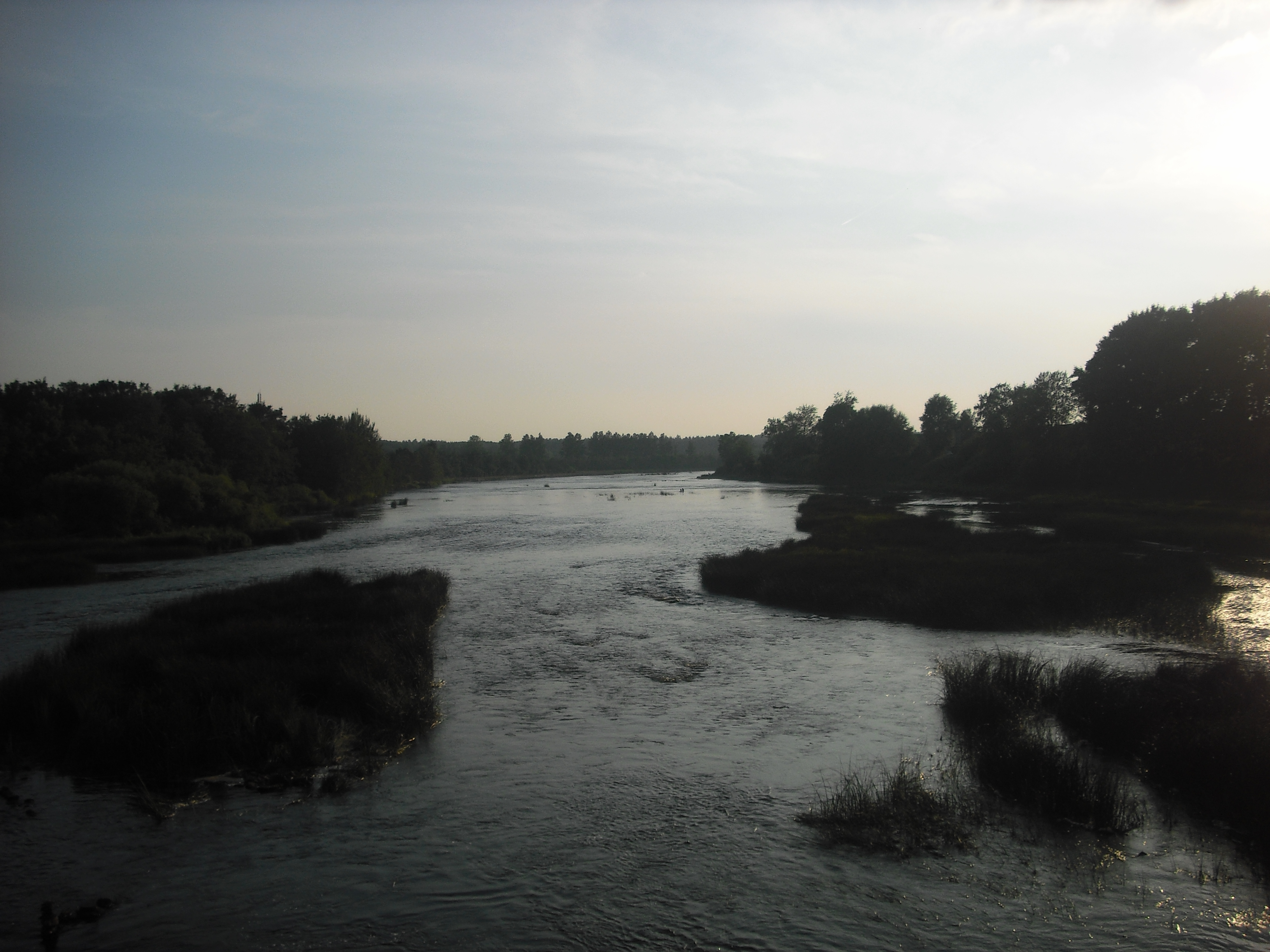 Река Луга в окрестностях Ямбурга (ныне Кингиссепп)